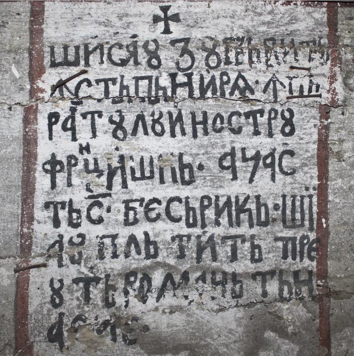 Biserica de lemn din Măgura, judeţul Sălaj.